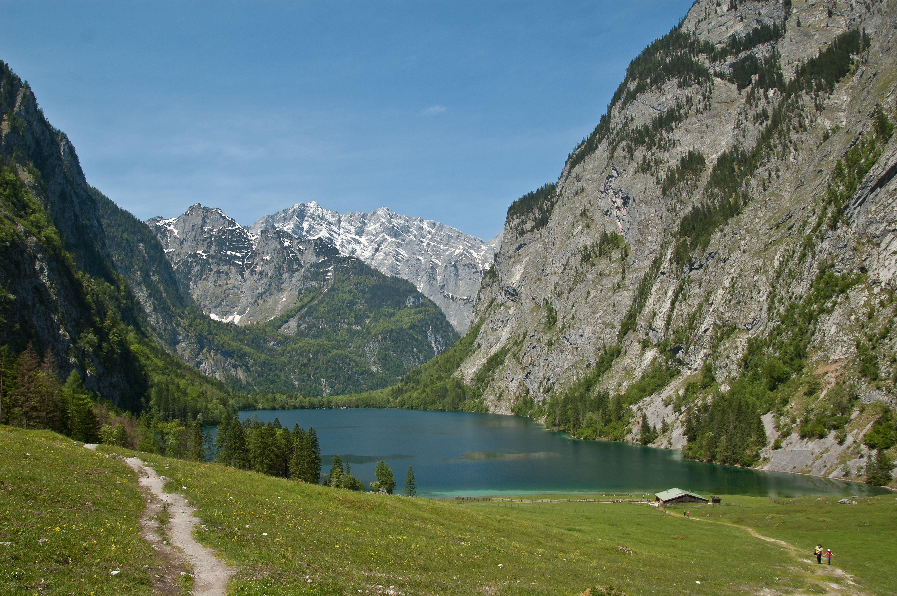 Blick von Süden über Fischunkelalm und Obersee auf Hacherlköpfe und das dahinterliegende Watzmannmassiv